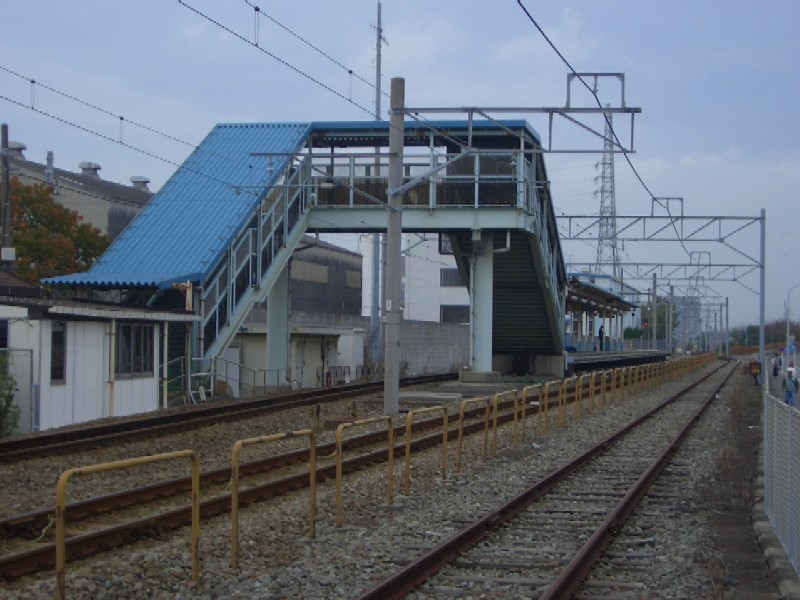 Kita-Chigasaki Station on JR Sagami Line, Chigasaki, Kanagawa 北茅ヶ崎駅